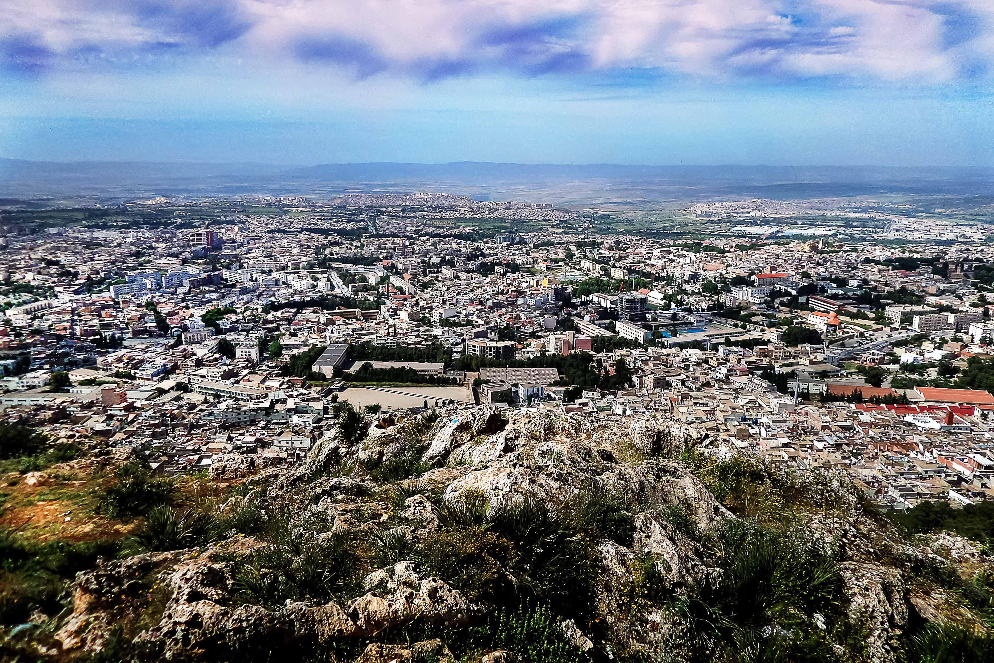 Tlemcen - تلمسان